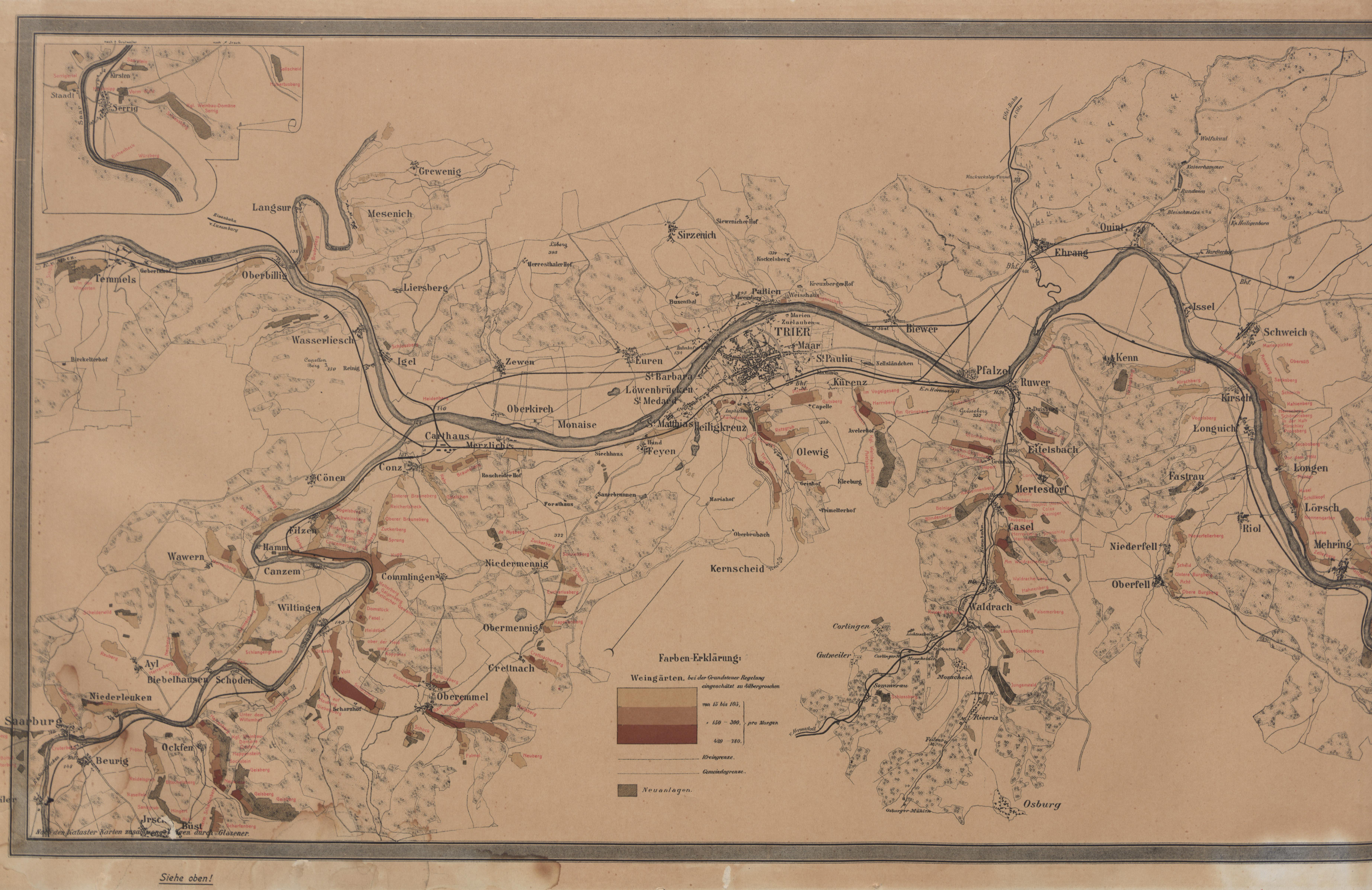 [Trier] : 1906; [Electronic ed.] Koblenz : Landesbibliothekszentrum Rheinland-Pfalz, 2010.